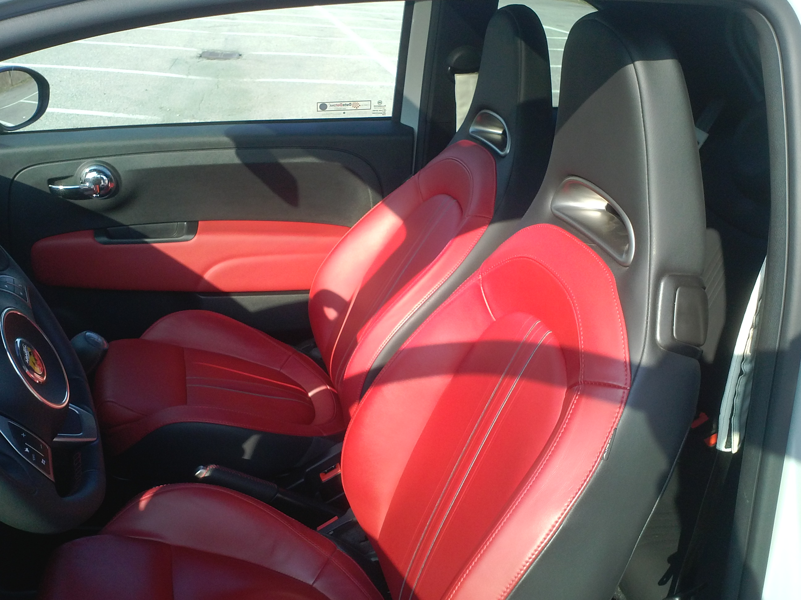 Abarth 500 - Sedili in pelle rossa